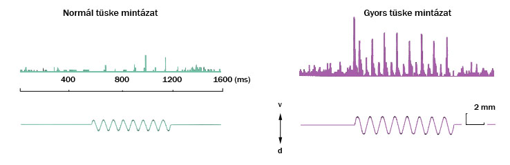 EEG